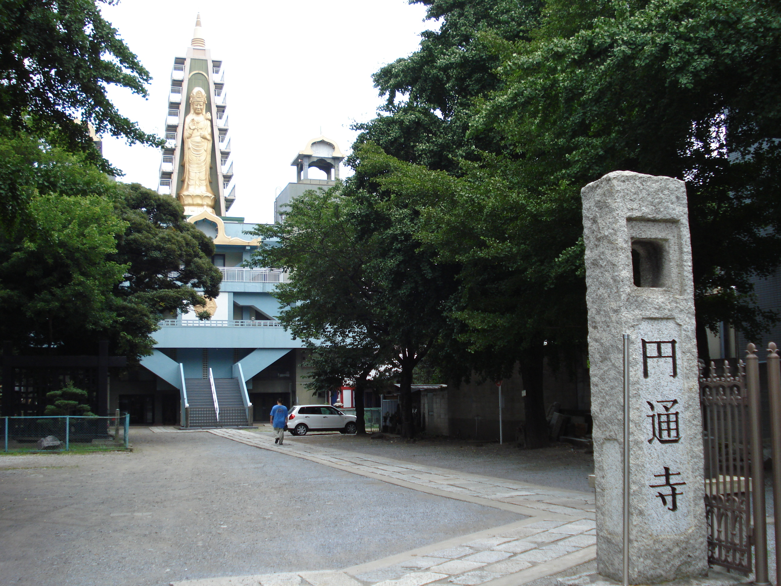 temple